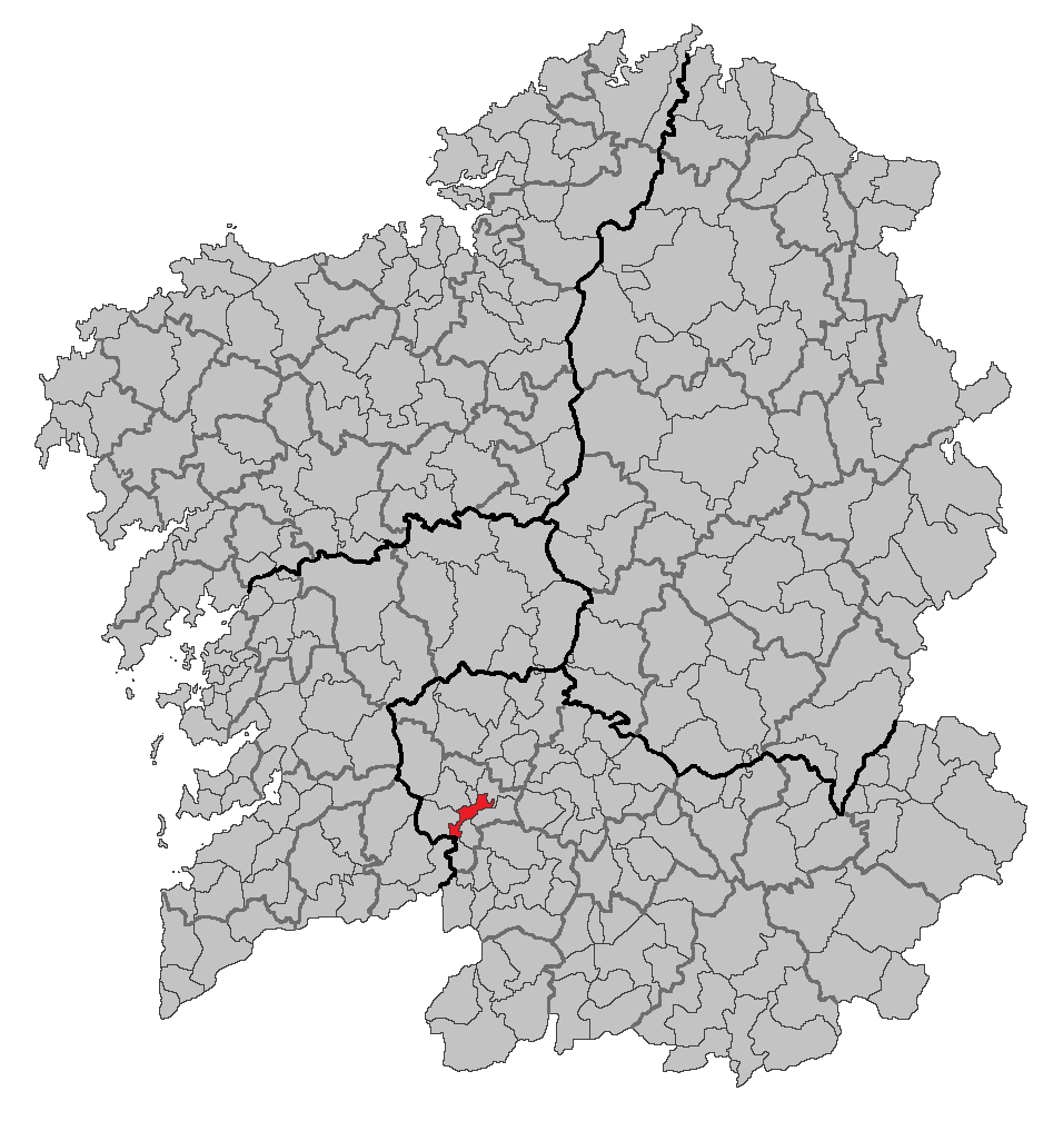 Mapa coa localización do concello de Ribadavia.